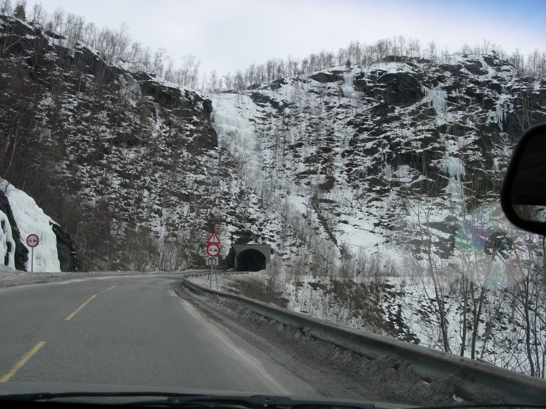 Stokkviknakkentunnelen